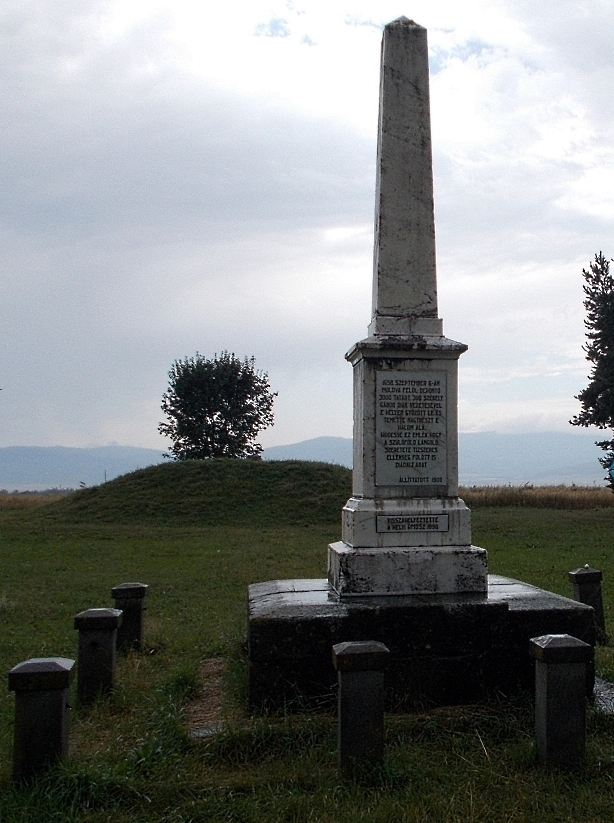 A gyergyószárhegyi Tatárdomb emlékoszlopa